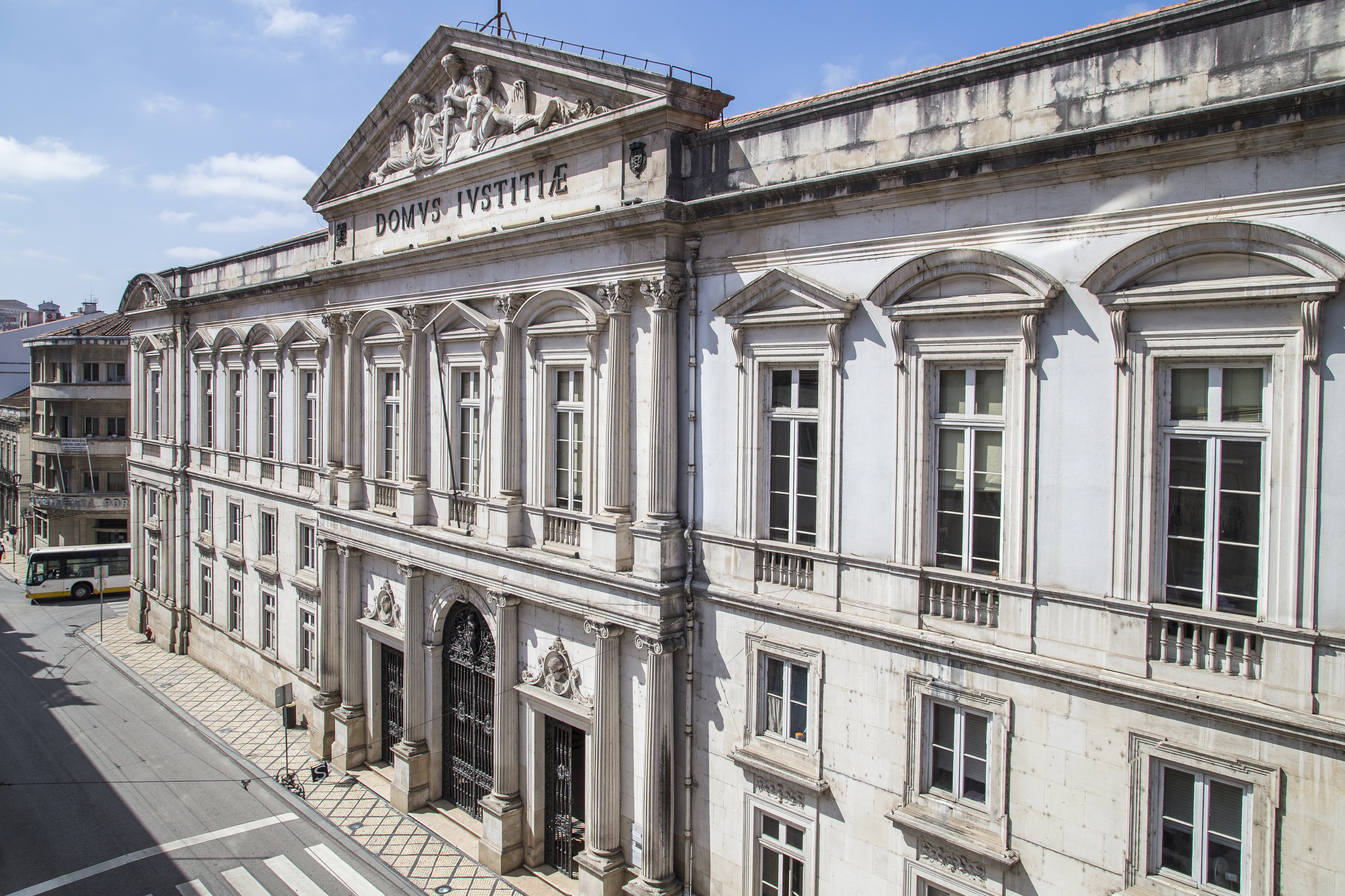 Fachada do Tribunal da Relação de Coimbra